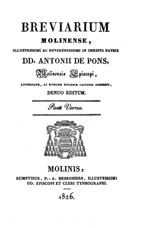 Page de garde du Breviarum Molinense. Bréviaire édité pour son diocèse par Mgr de Pons, évêque de Moulins, 1826